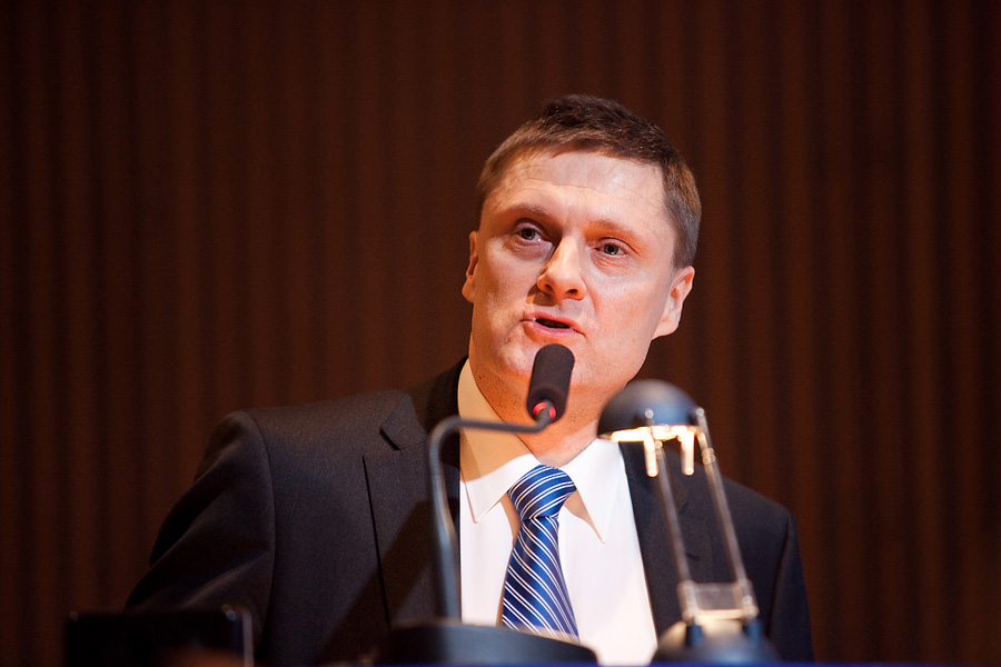 Teemu Lehtinen Vero2013-tapahtumassa Helsingissä.